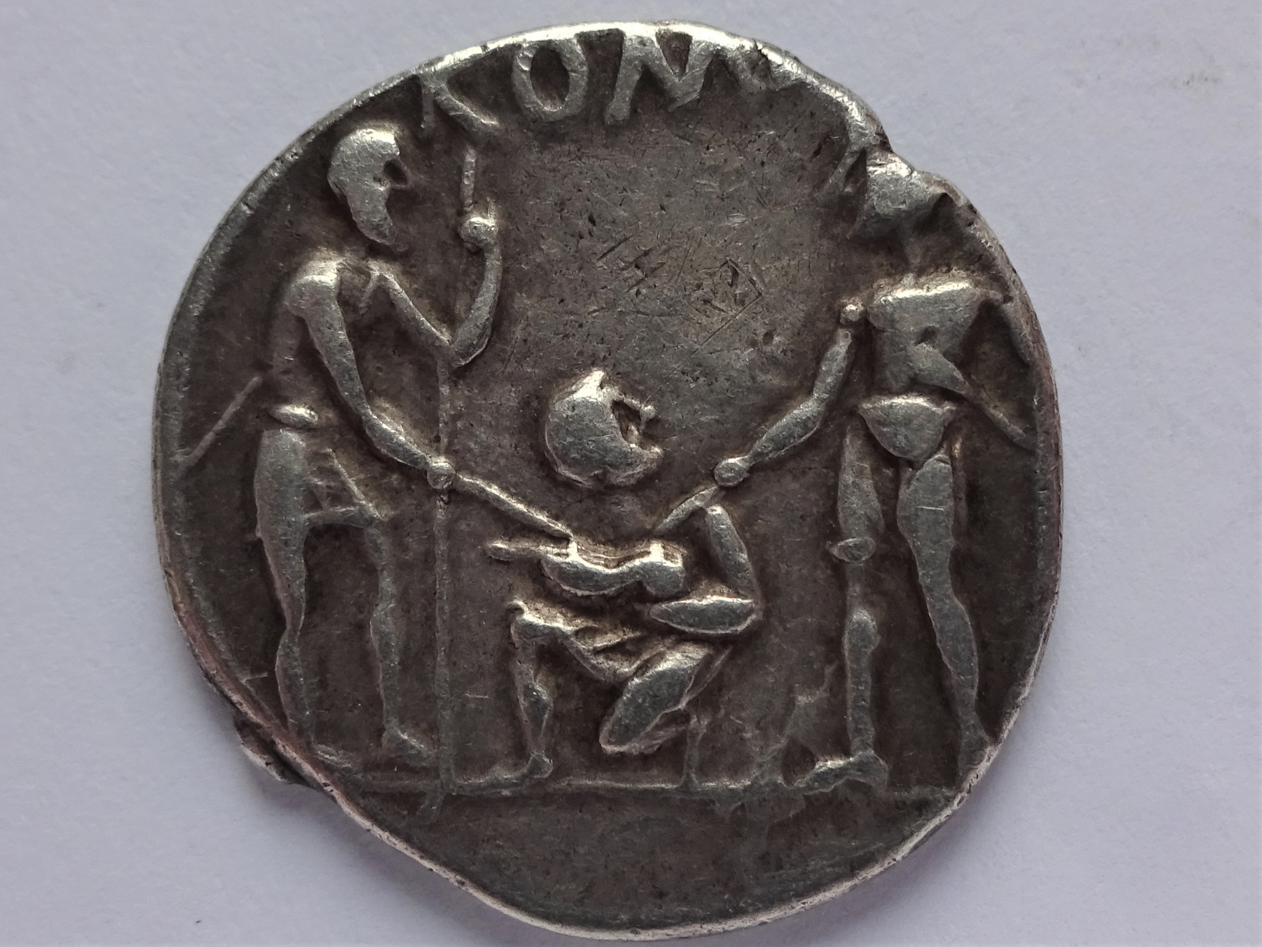 früheste Schwurszene auf einer römischen Münze, zwei Soldaten berühren mit Schwertspitzen einen knieenden Mann mit Ferkel im Arm, Denarrückseite, Jahr 137 v. Chr., Albert 897, Crawford234/1